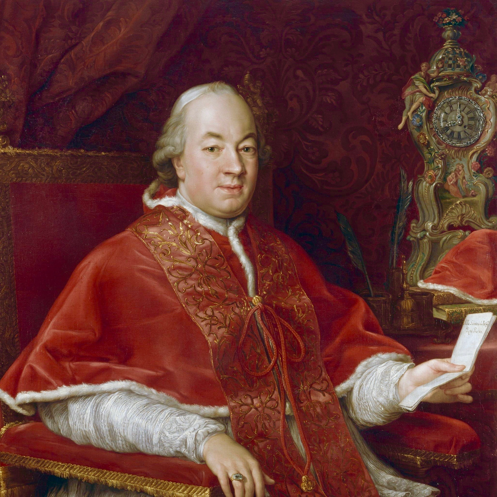 Pie VI (pape)